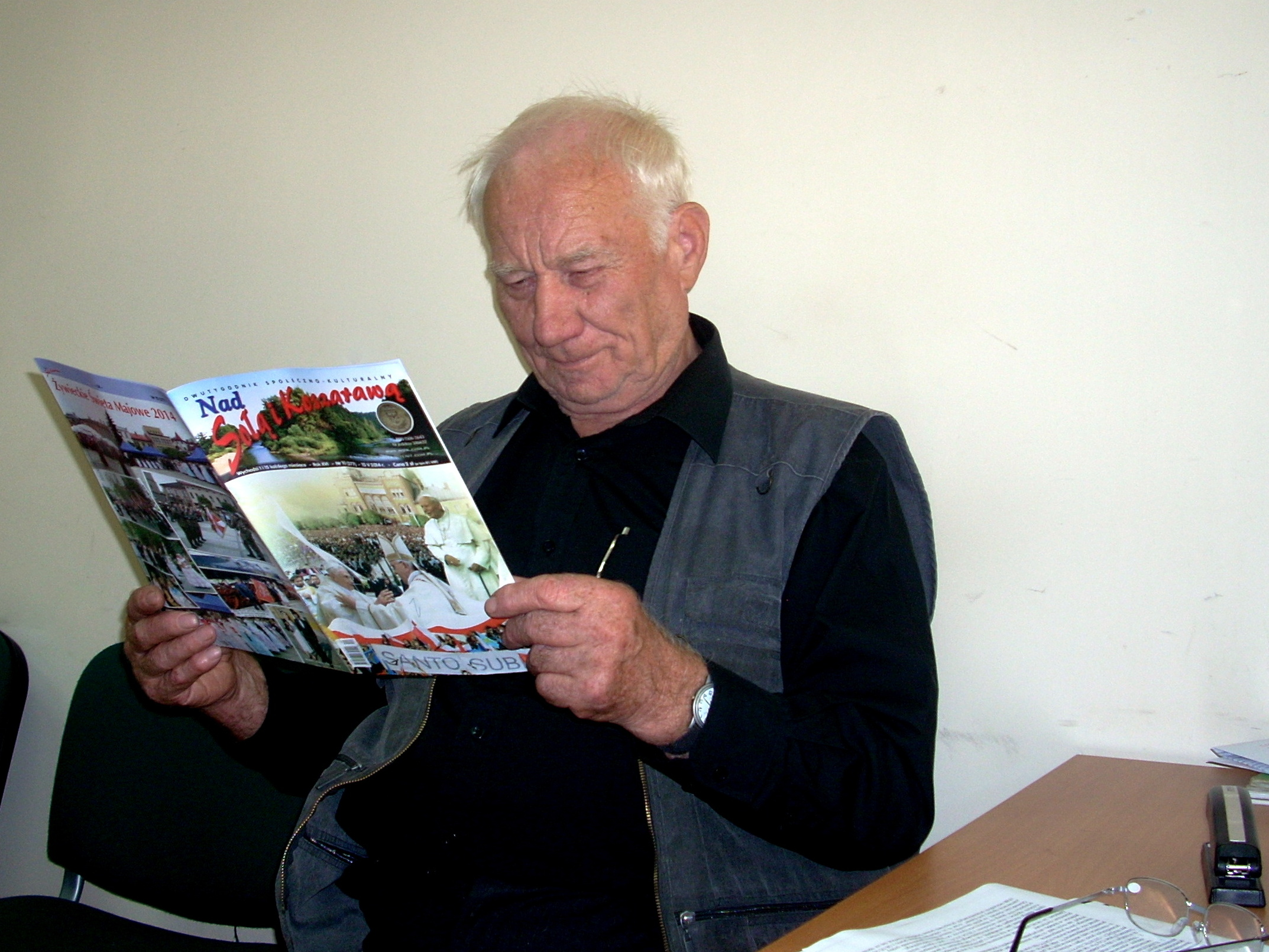 Redaktor Naczelny NSiK Hieronim Woźniak